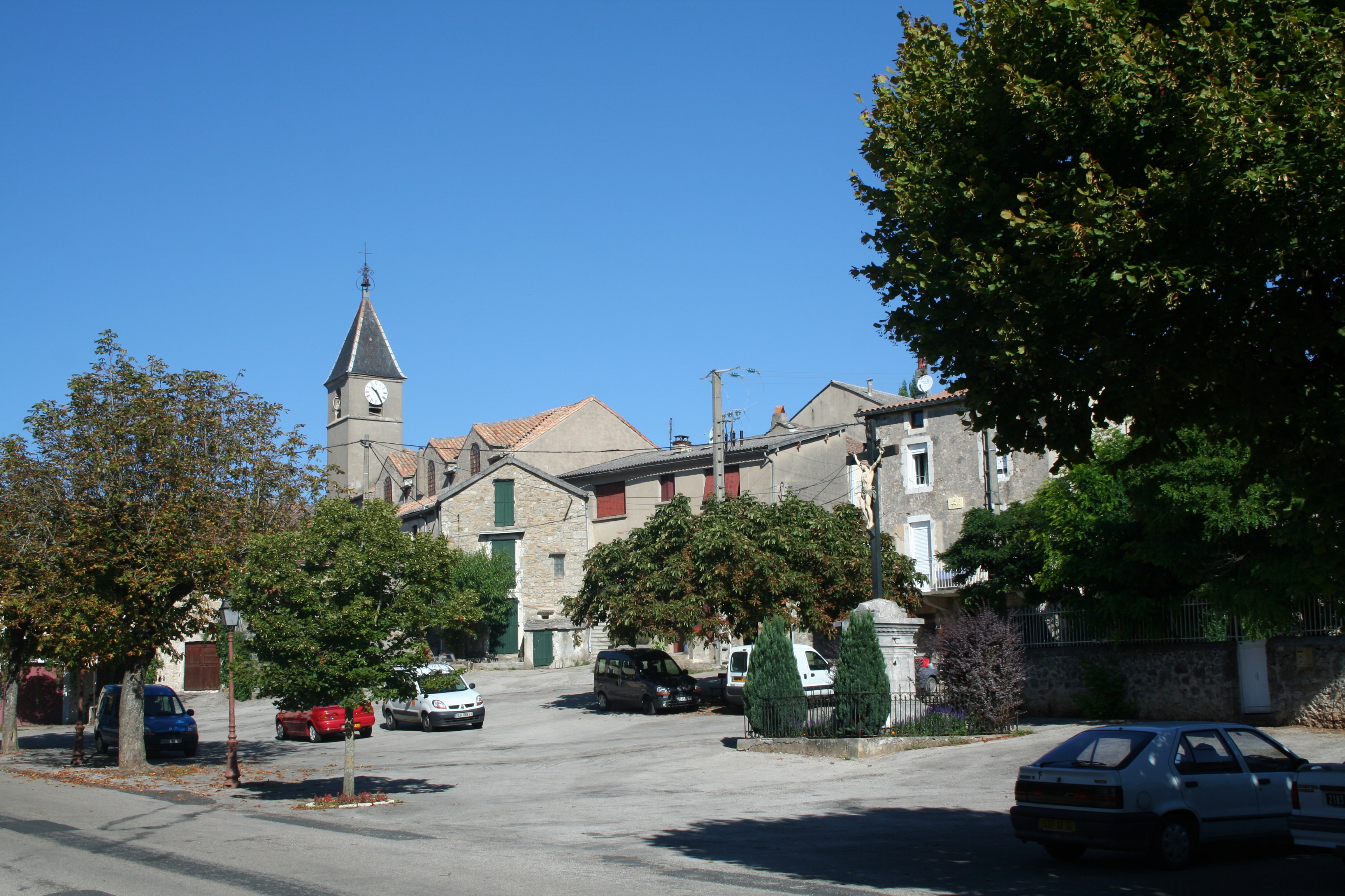 L'Hospitalet-du-Larzac (Aveyron) - vue générale.